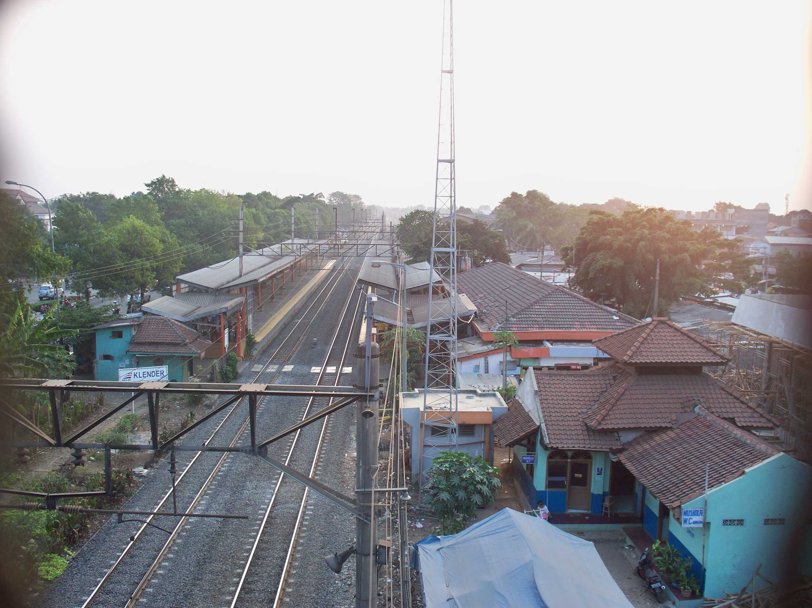 Stasiun Klender